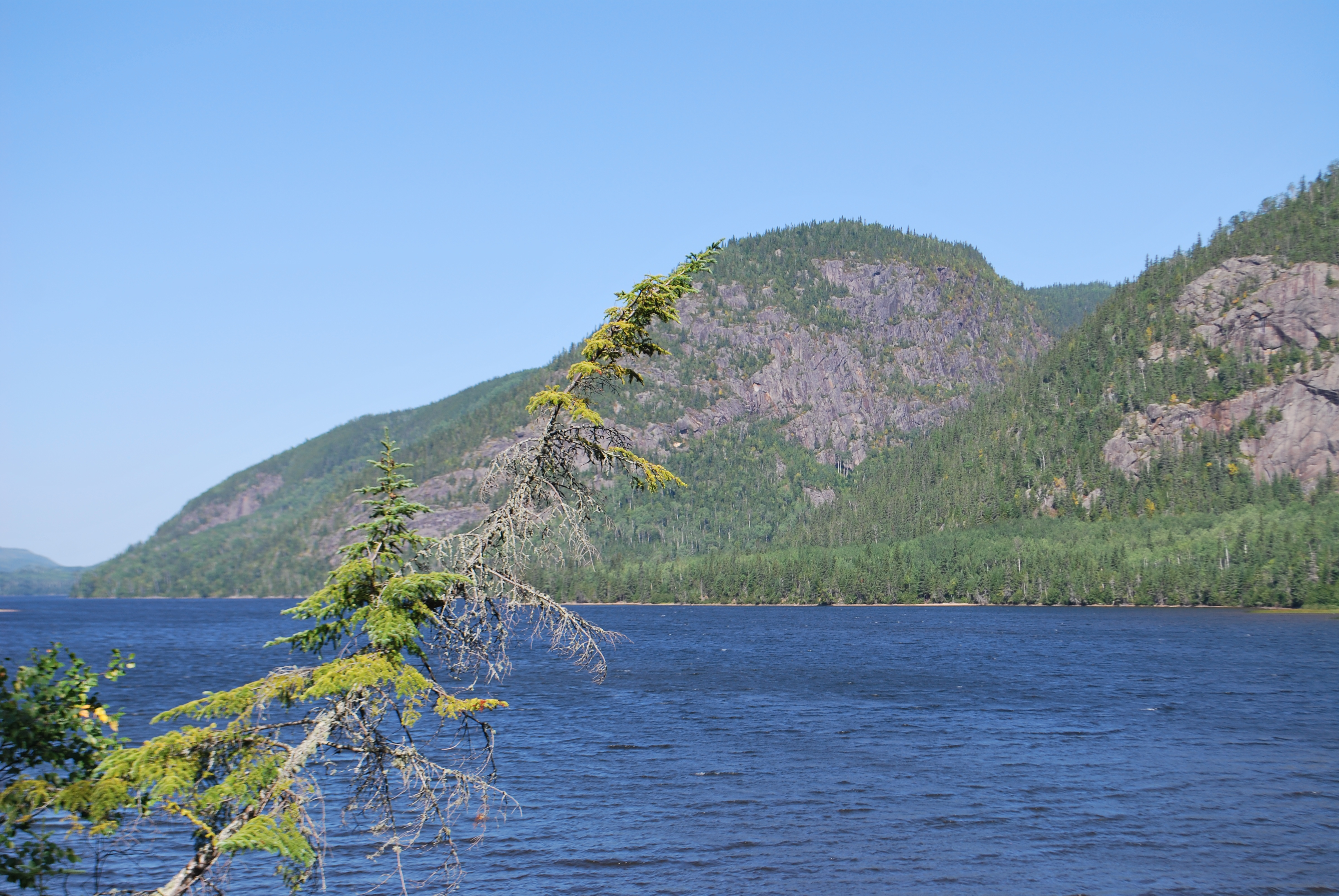 Alentours du Lac Ha! Ha!, à Ferland-et-Boilleau, au Québec.